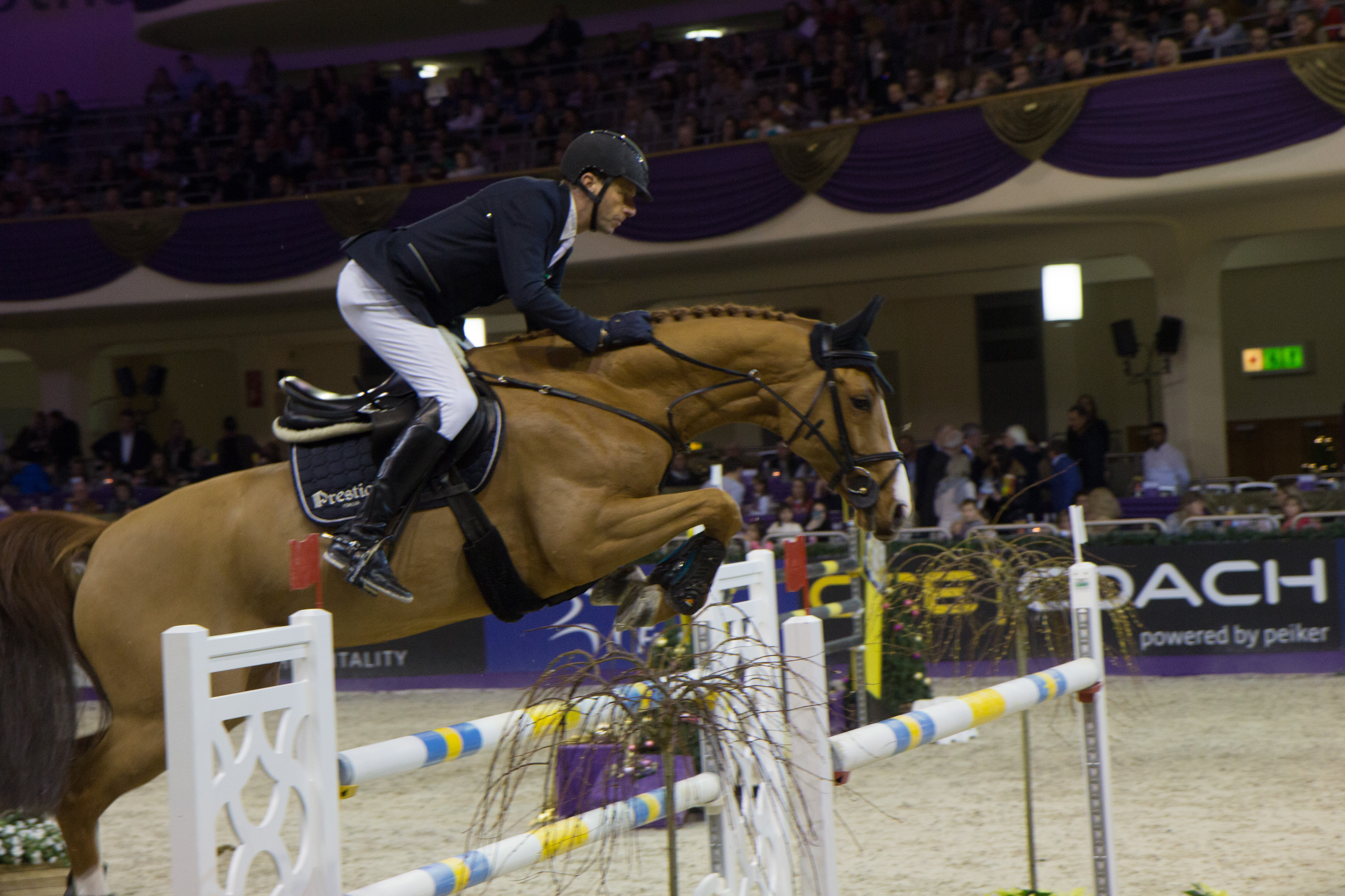 Internationales Festhallen Reitturnier 2017 in Frankfurt. Carsten-Otto Nagel auf Castello213